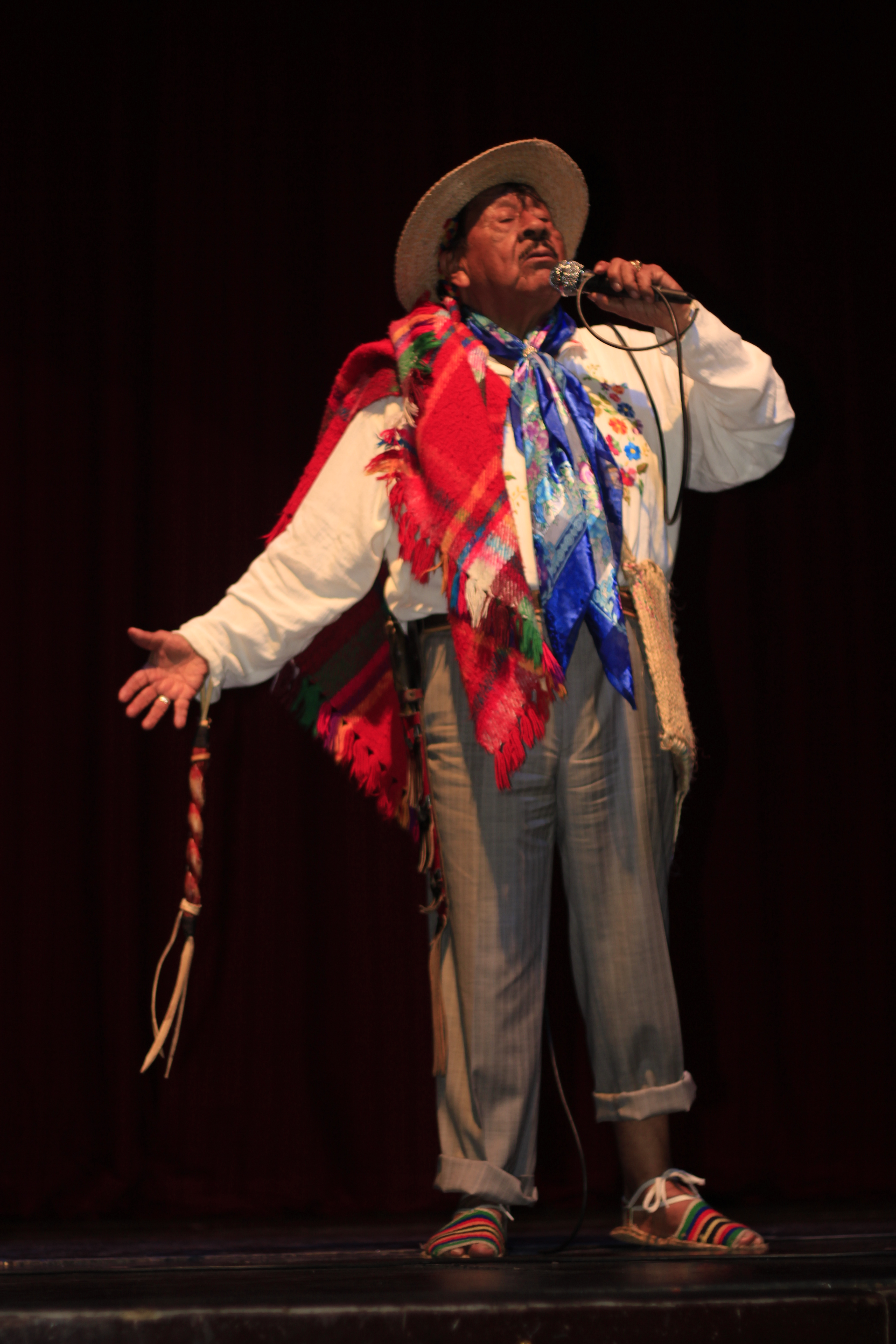 Indio Rómulo en una de sus presentaciones públicas